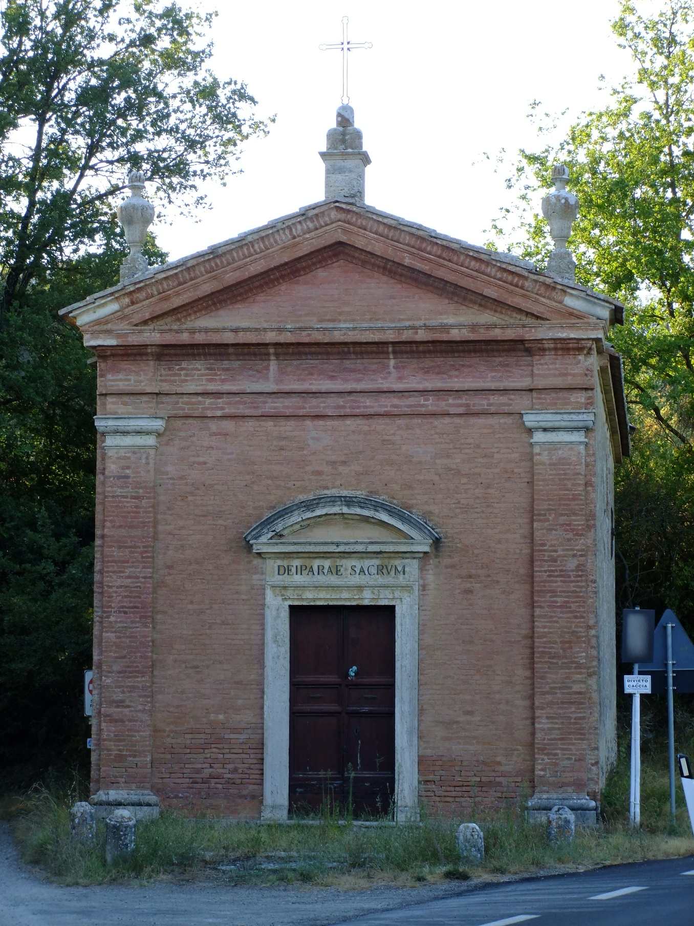 Chiesa di Santa Maria delle Grazie (o chiesa della Madonna del Tribbio) a San Giovanni d'Asso, Siena